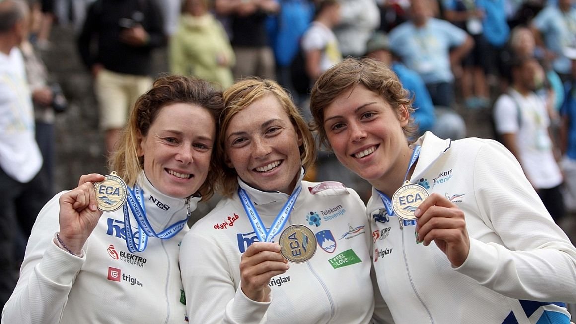 Evropske prvakinje Tacen 2017